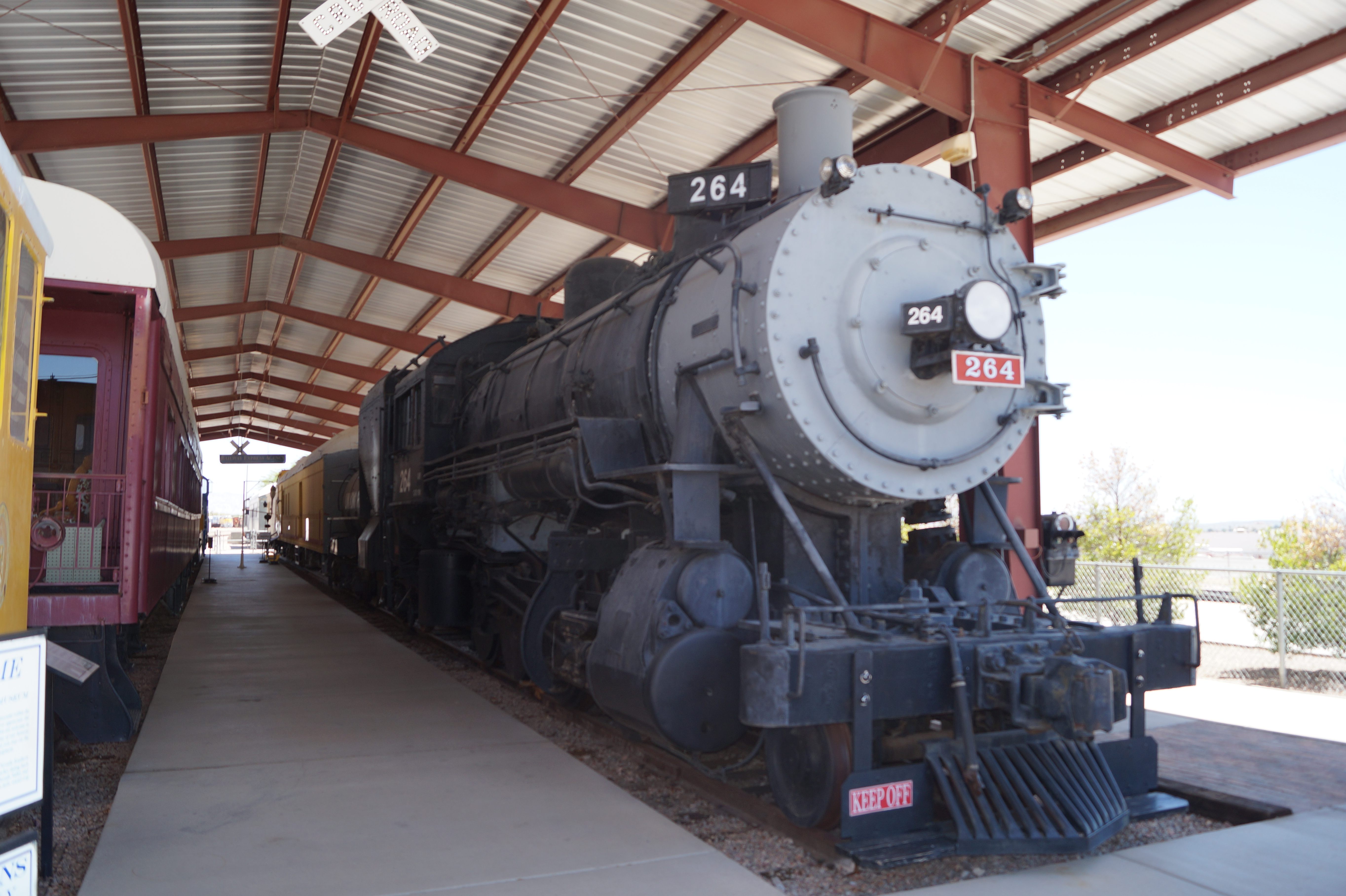 The Nevada State Railroad Museum is an agency of the Nevada Department of Cultural Affairs. It is located at Yucca Street on the tracks of the historic Union Pacific Railroad branch Henderson-Boulder City near the former Boulder City Railroad Yards where the Hoover Dam construction equipment was unloaded in the 1930s.